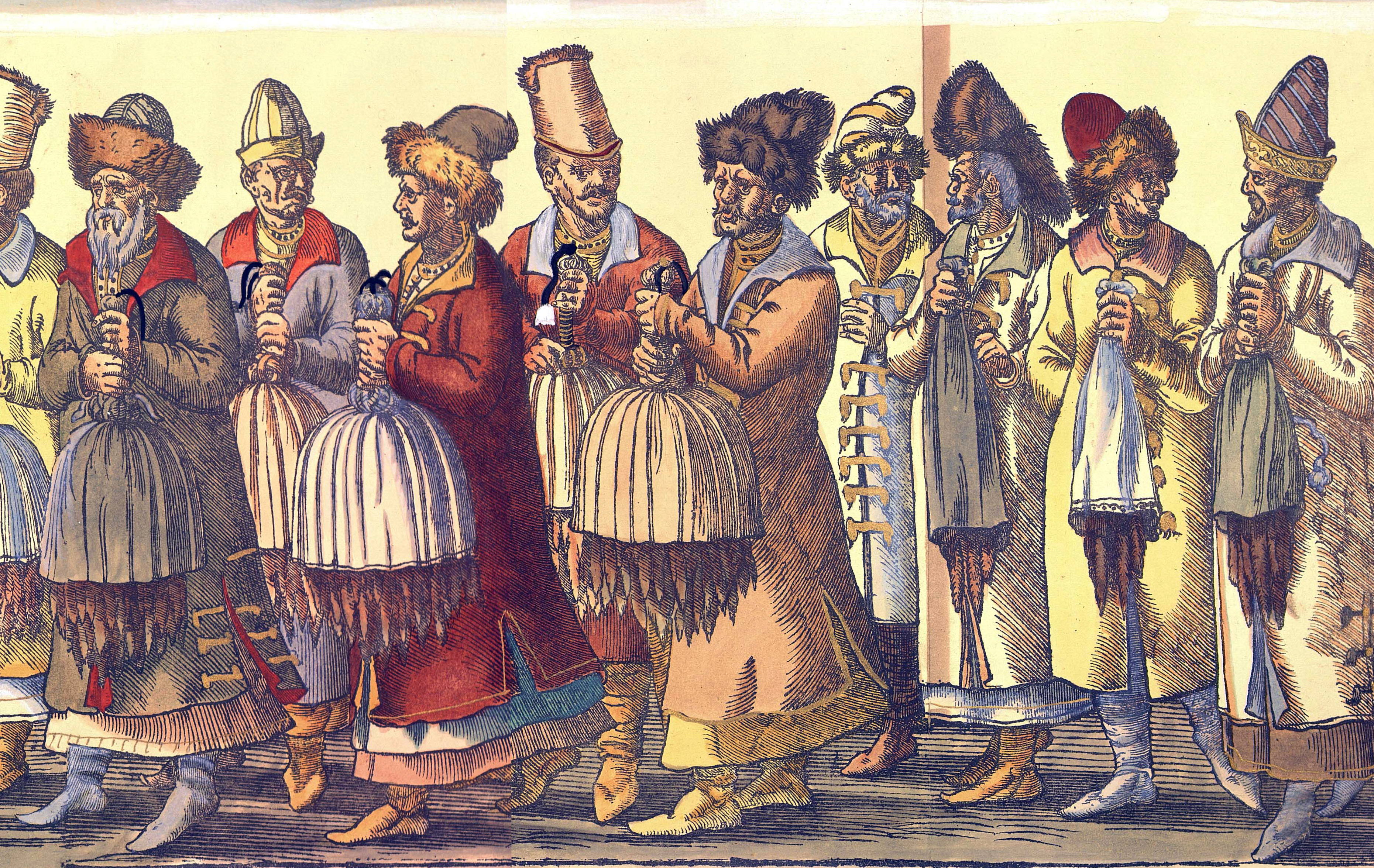 Russian ambassadors Русское посольство к императору Священной Римской империи Максимилиану II. 1576 г. Западноевропейская гравюра.